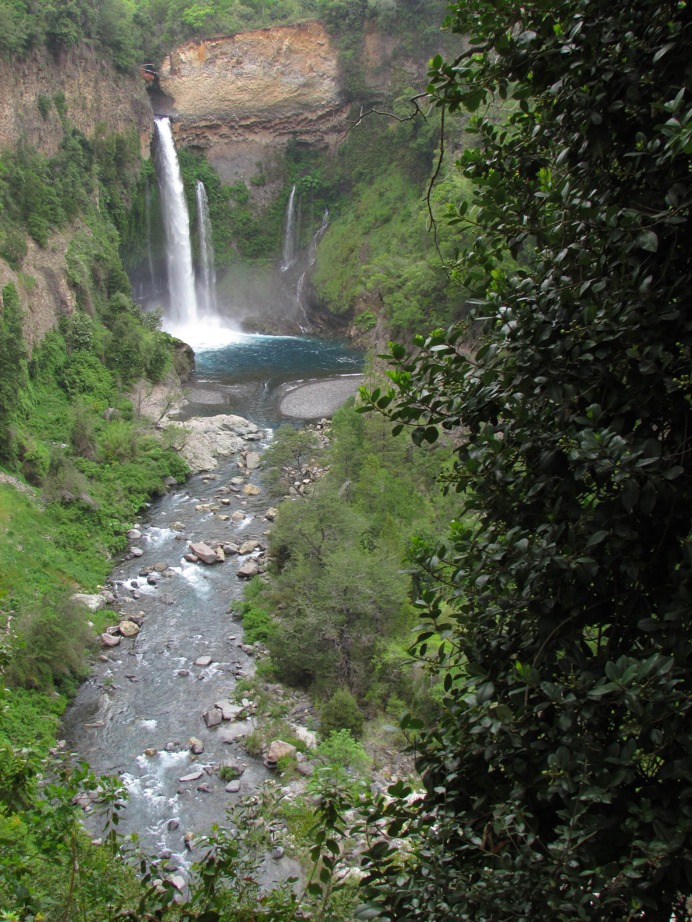 Maule, siete tazas